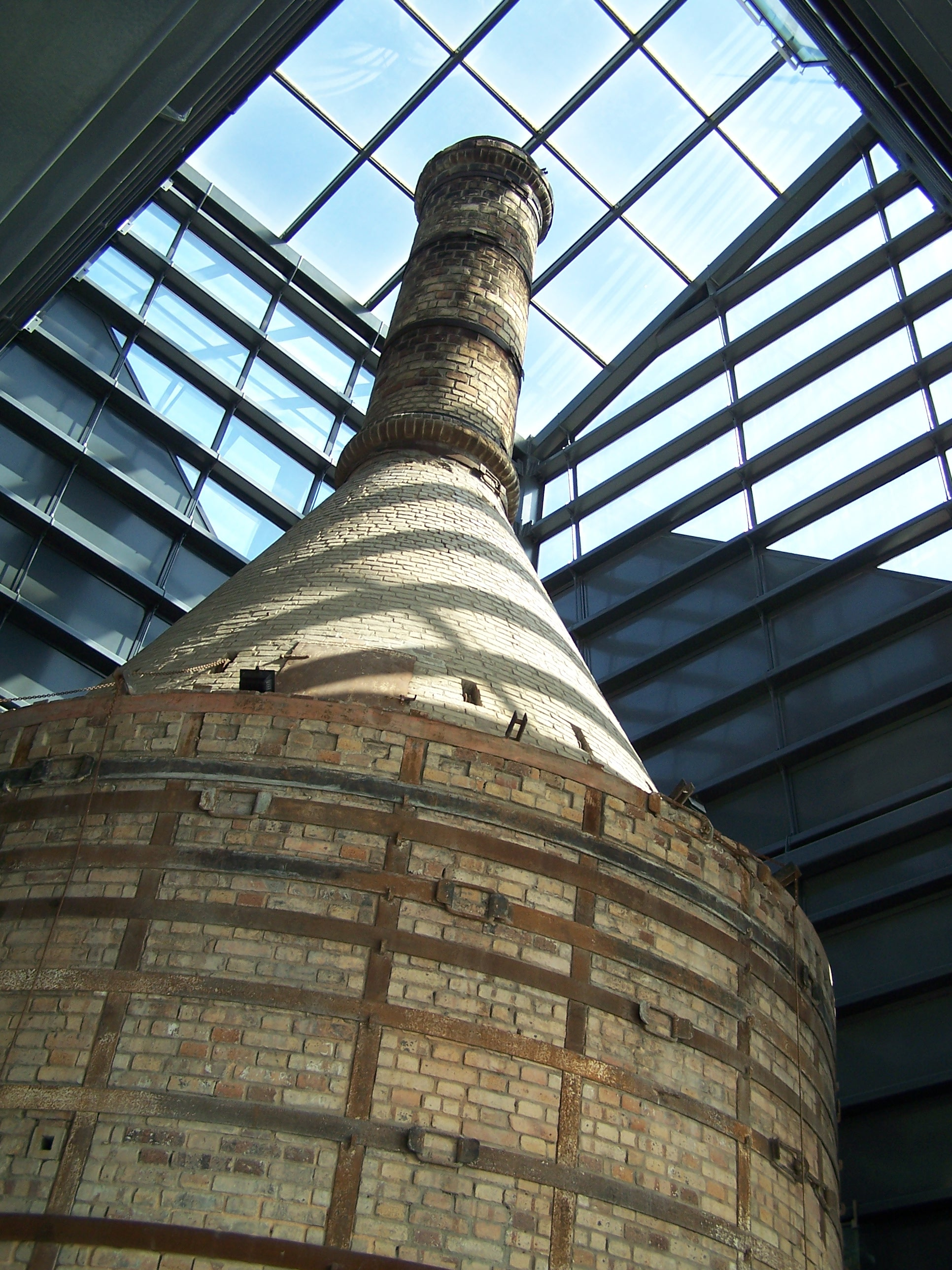 Museu da Cerâmica - Forno 18 - I /